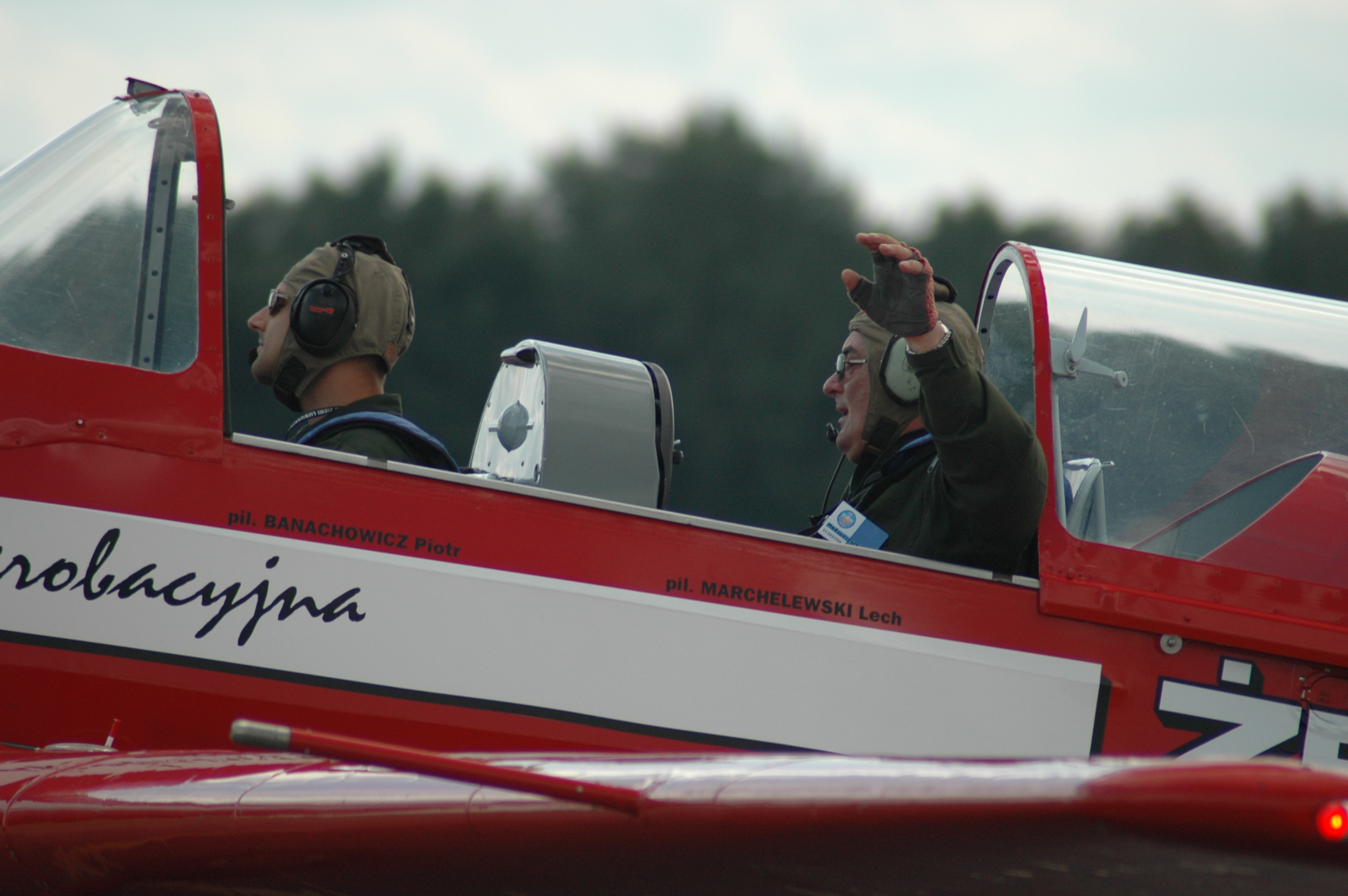 Lech Marchelewski i Piotr Banachowicz - AirShow Radom 2005